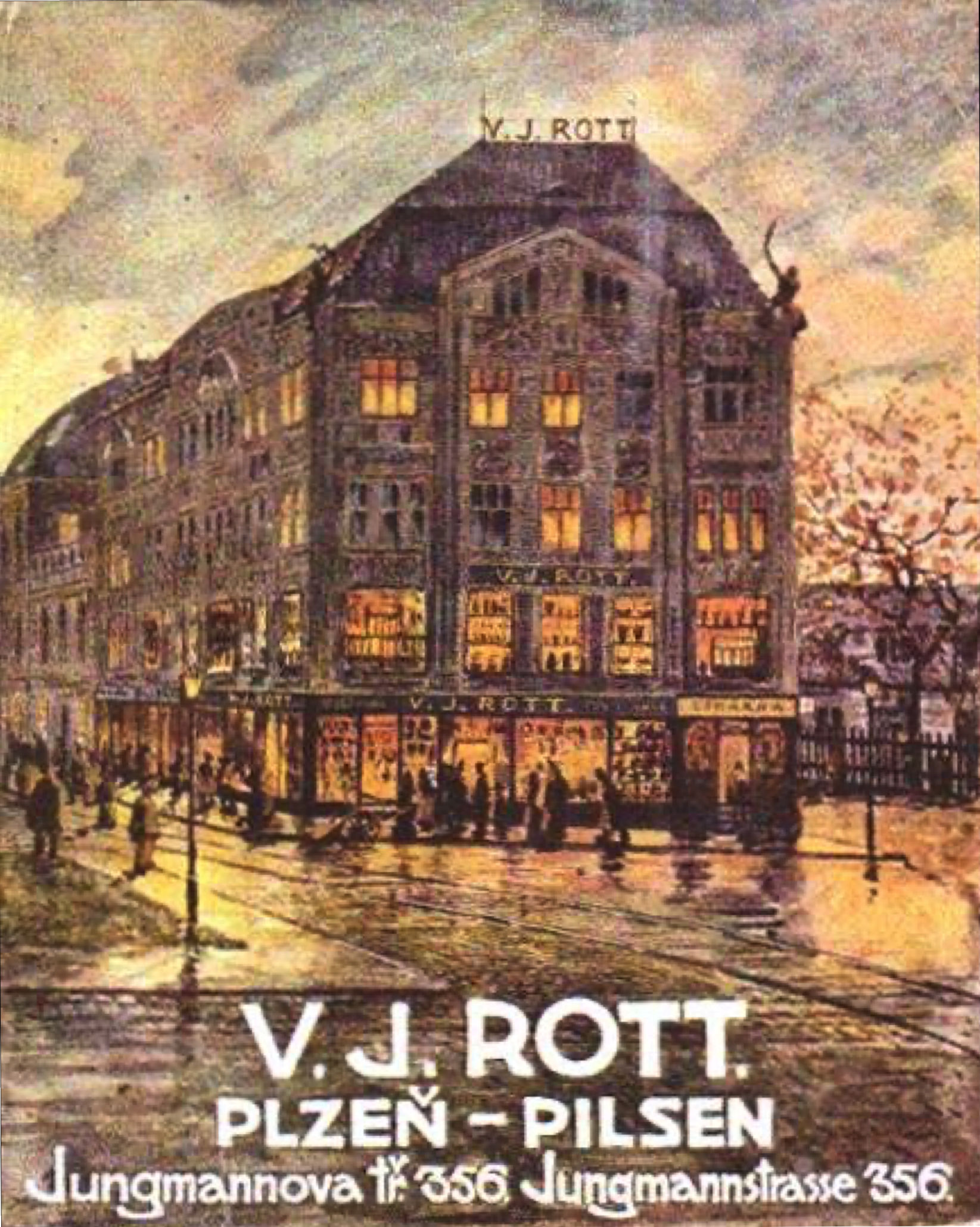 V. J. Rott Plzeň, Jungmannova 356 1914-24